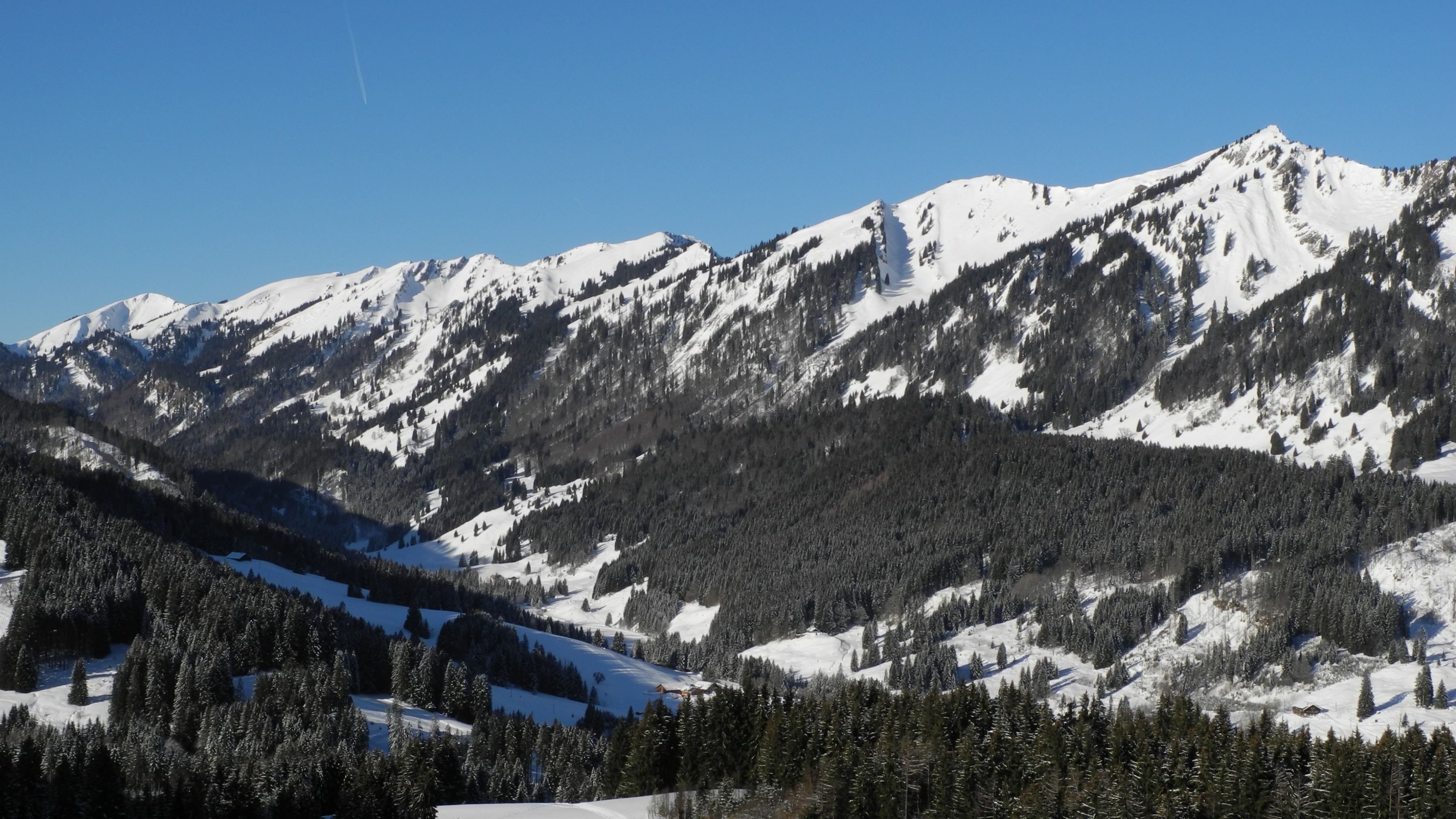 Blaichach - Nagelfluhkette über dem Gunzesrieder Tal